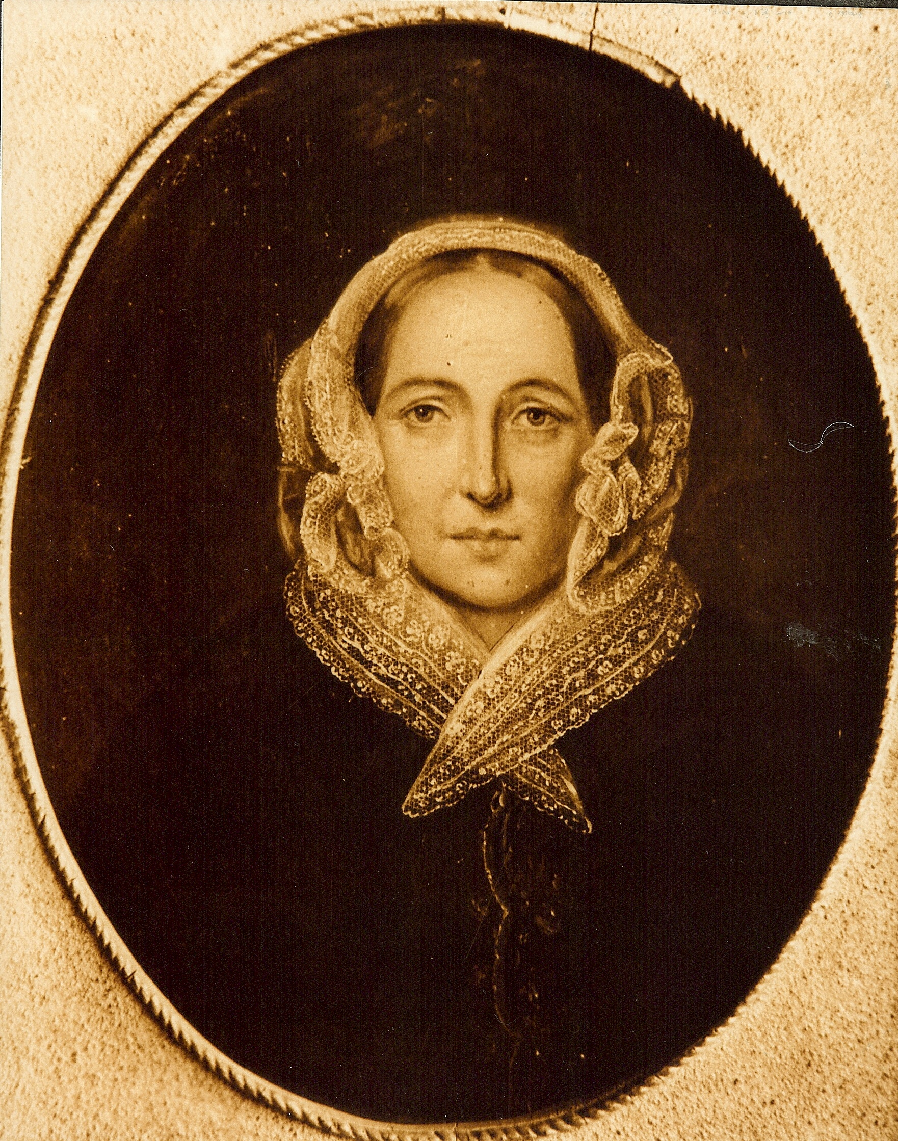 Fotografía de Pintura familiar del S. XIX